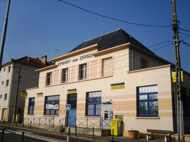 L'agence postale d'Epinay-sur-Orge (91)